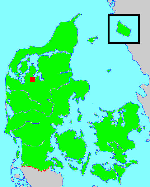 Kort sem sýnir staðsetningu Skive í Danmörku.